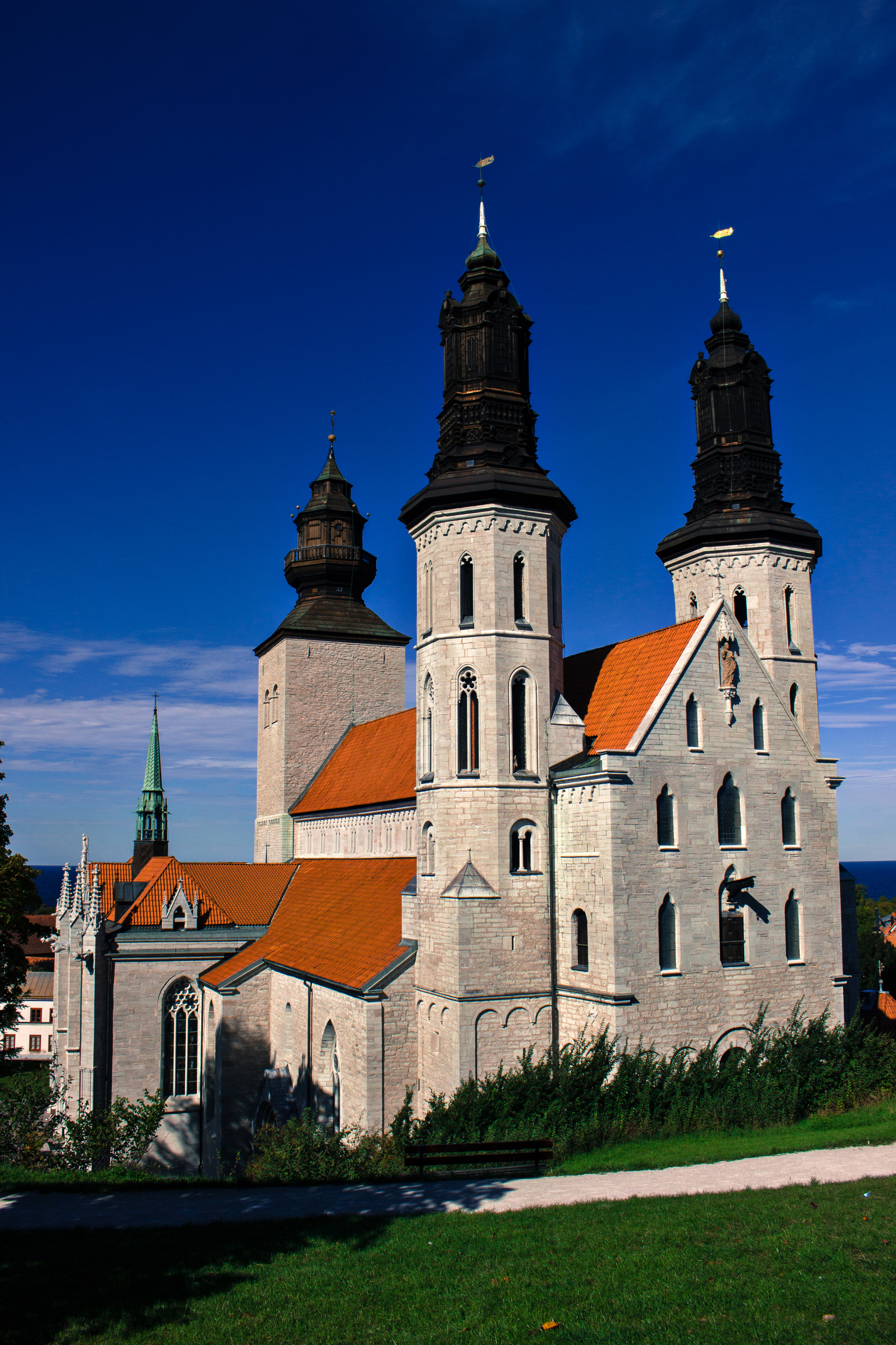 Catedral de Visby.